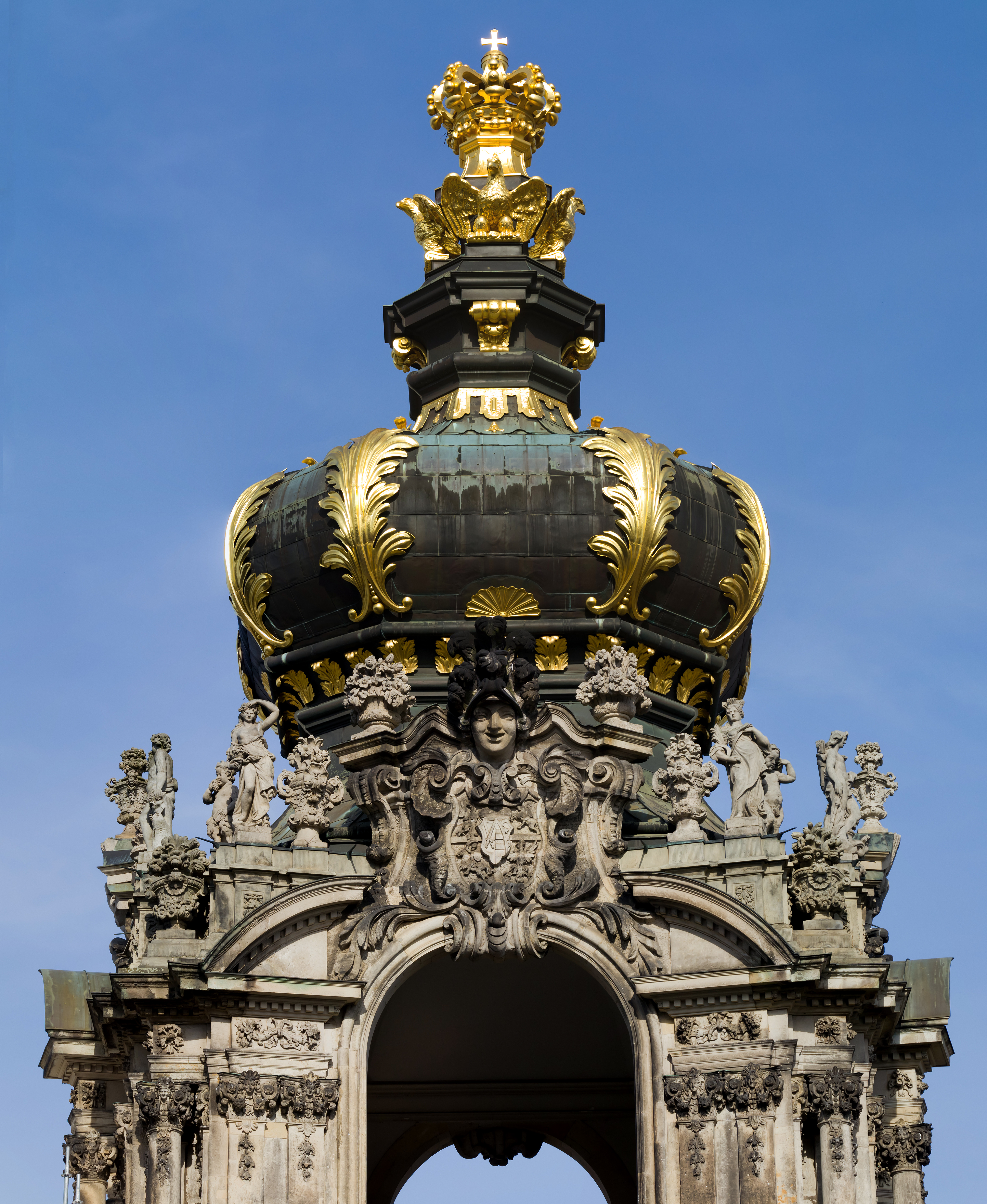 Kronentor des Dresdner Zwingers. Attikabereich und Krone